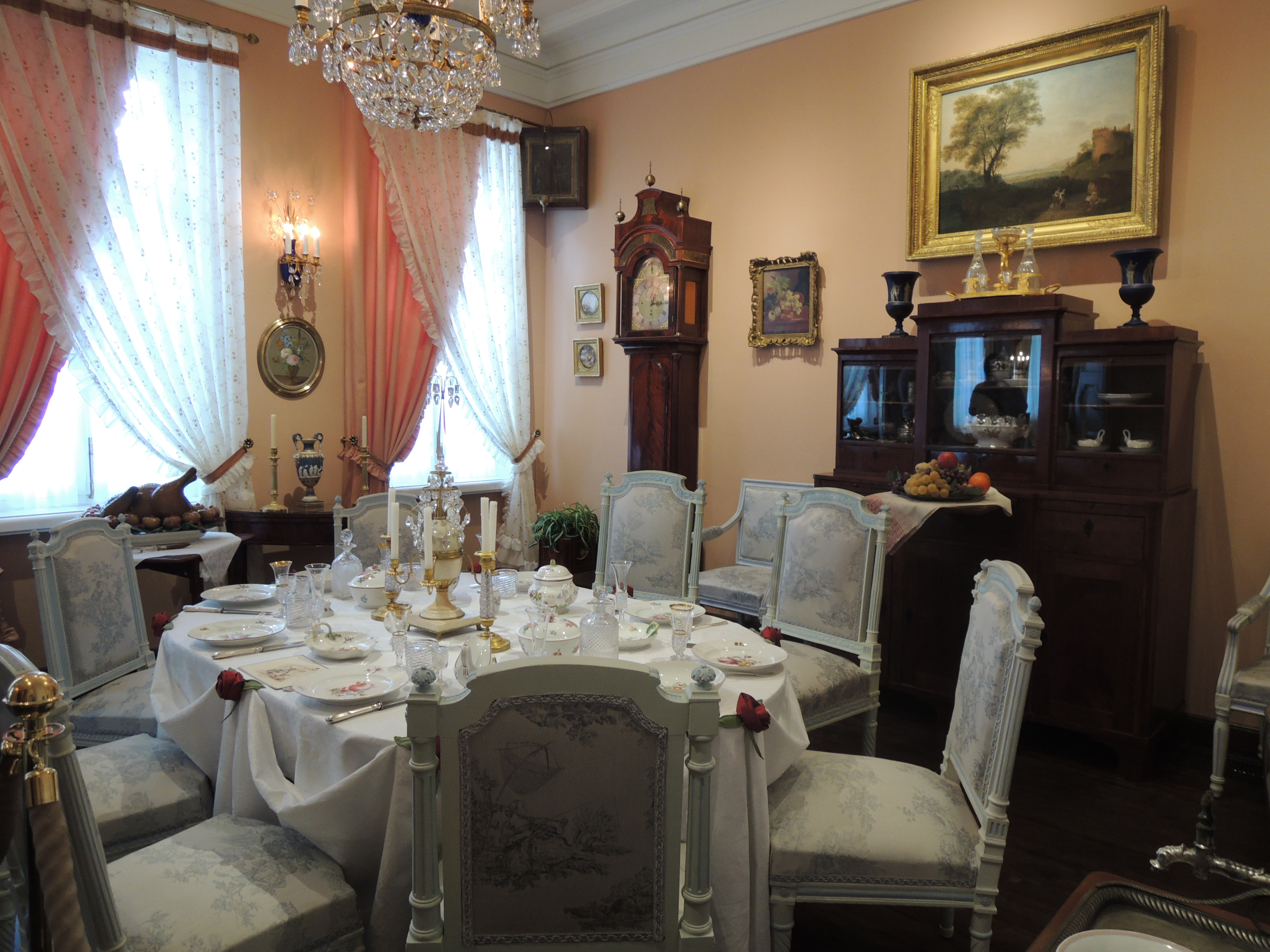 Дом-музей В. Л. Пушкина (филиал Государственного музея А. С. Пушкина) в день открытия 6 июня 2013 после масштабной реконструкции